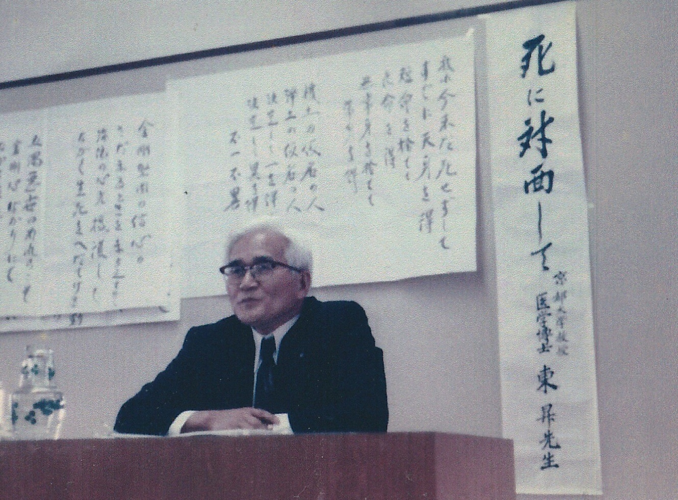 高倉会館にて講演。昭和48年9月16日